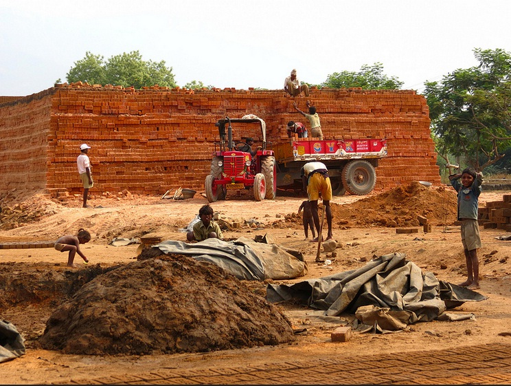 Hyderabad brick kiln scene